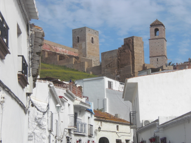 Kastelo de Álora